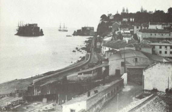 Funchal Antigo e Costumes da Madeira - Pontinha e S. Lázaro